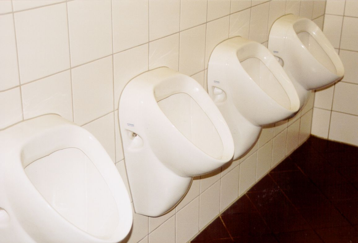 Beschreibung: Urinale in der Toilette der neuen Messegebäude der Stadt Dresden (ehm. Schlachthofgelände) Quelle: Fotografiert am 8. Juni 2003 Fotograf: Stefan Kühn